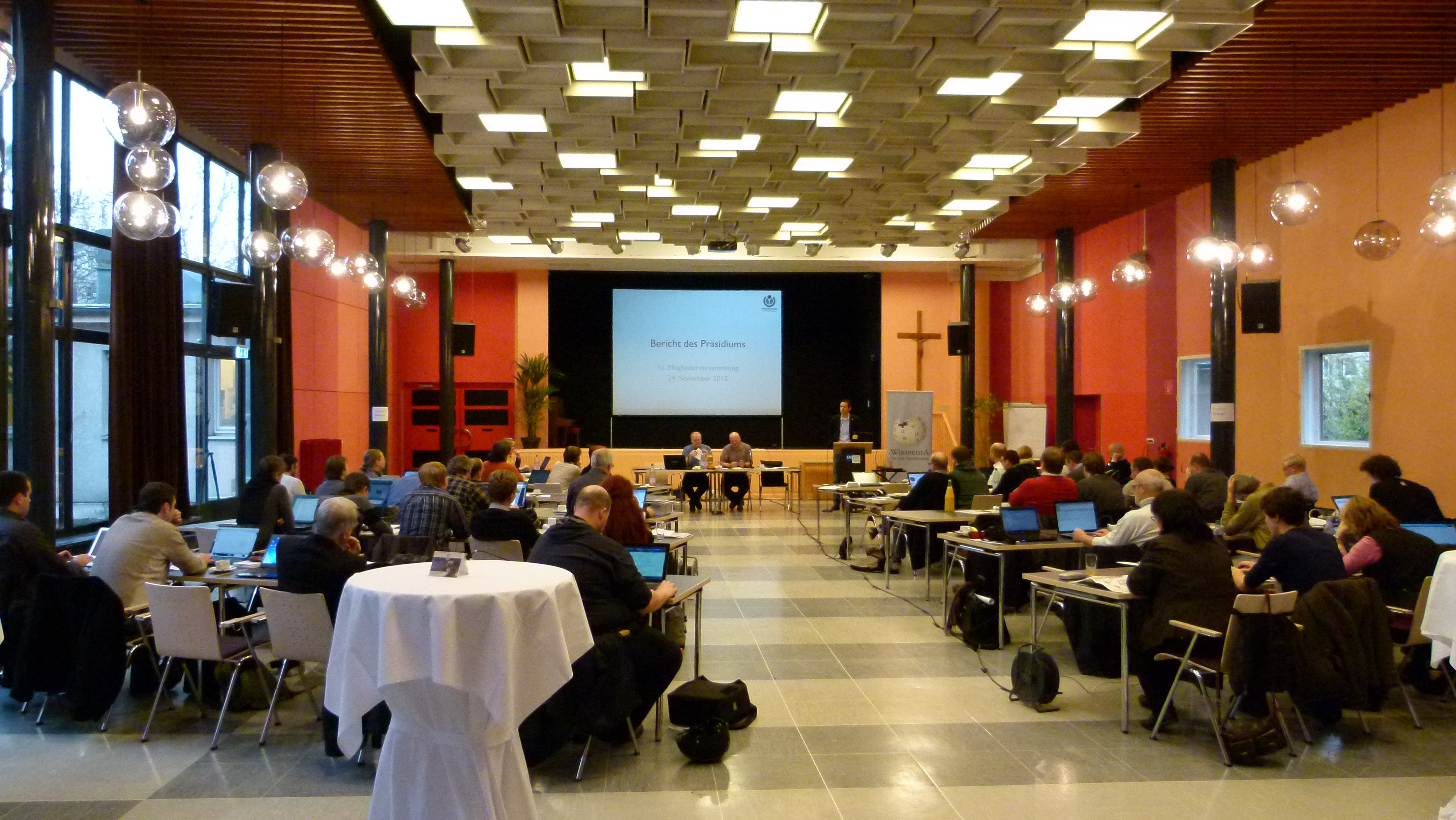 11. Mitgliederversammlung des Wikimedia Deutschland e.V. am 24.11.2012 in Berlin - Bericht des Vorsitzenden Sebastian Moleski